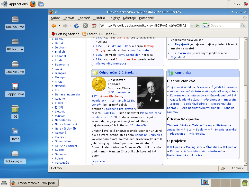 Xubuntu - Firefox